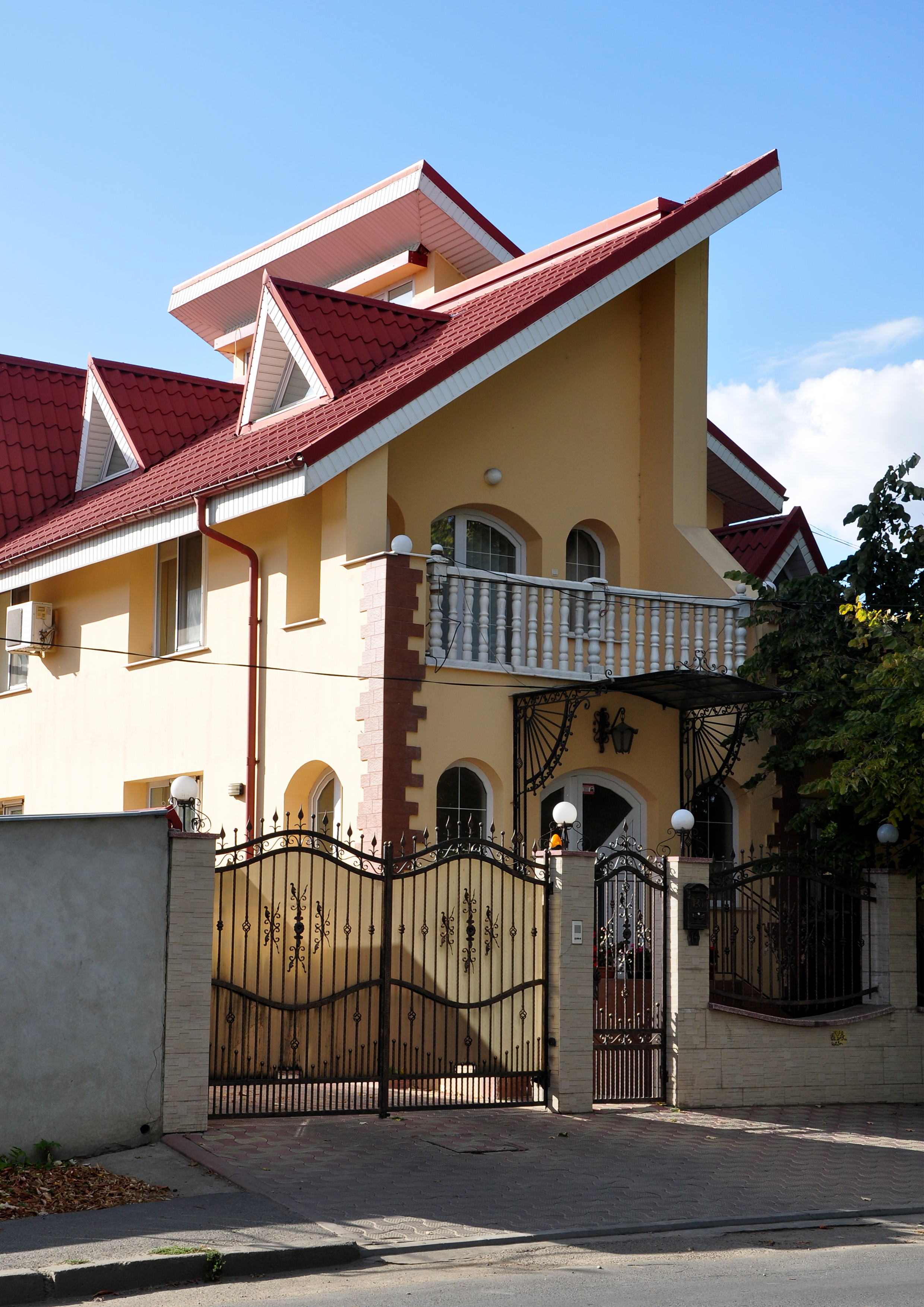 Casa Corbu, azi Casa Stoian, situata in Barlad pe strada Str. Nicolae Bălcescu Nr. 13, a fost ridicata in anii 1880.